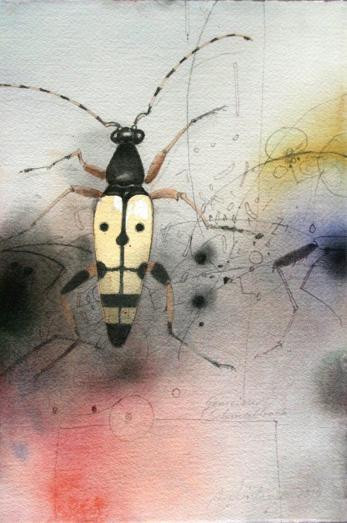 Willy Reichert, Stilrichtung Insekten